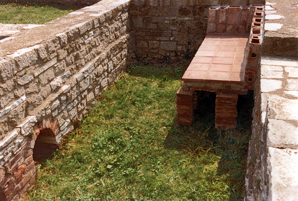 Kleines Annexbad, vielleicht für Offiziere, vor der Porta Principalis Sinistra. Es wurde auch vermutet, daß dieses Bad 213 ad hoc für den Besuch Kaiser Caracallas errichtet worden ist. Um 260 ist das Gebäude in den Alamannenstürmen untergegangen. Zustand im Sommer 1983.